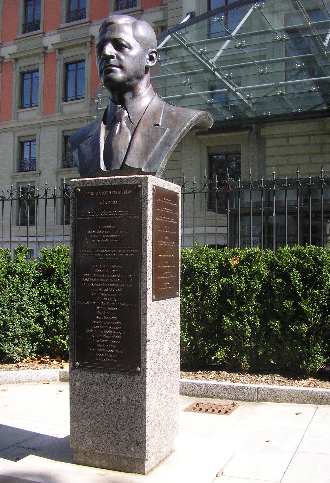 Buste de Sergio Vieira de Mello devant le Palais Wilson à Genève.Au devant de la stèle, on peut lire : « SERGIO VIEIRA DE MELLO 1948-2003 - Secrétaire général adjoint des Nations Unies. Haut Commissaire des Nations Unies aux droits de l'homme. Représentant spécial du secrétaire général des Nations Unies en Irak. Humaniste. Ardent défenseur de la paix, de la cause humanitaire et des droits humains. Tué à Bagdad le 19 août 2003 dans le bombardement du quartier général ds Nations Unies en Irak avec ses collègues : [suit la liste des personnes tuées].»Sur les côtés de la stèle figure la biographie de Vieira de Mello avec ses fonctions et les lieux de ses engagements.Au dos de la stèle, il est inscrit : « Donation du maître Zurab Tsereteli, Sculpteur, Président de l'Académie des Beaux Arts de la Fédération de Russie au Haut Commissariat des Nations Unies aux droits de l'homme en hommage à la mémoire de Sergio Vieira de Mello. Érigé en 2006 avec l'aimable concours de la Ville de Genève et en coopération avec la Fondation des Immeubles pour les organisations internationales.»Au dos du buste on peut lire « Aut. Z.K. Tsereteli, 2004.»